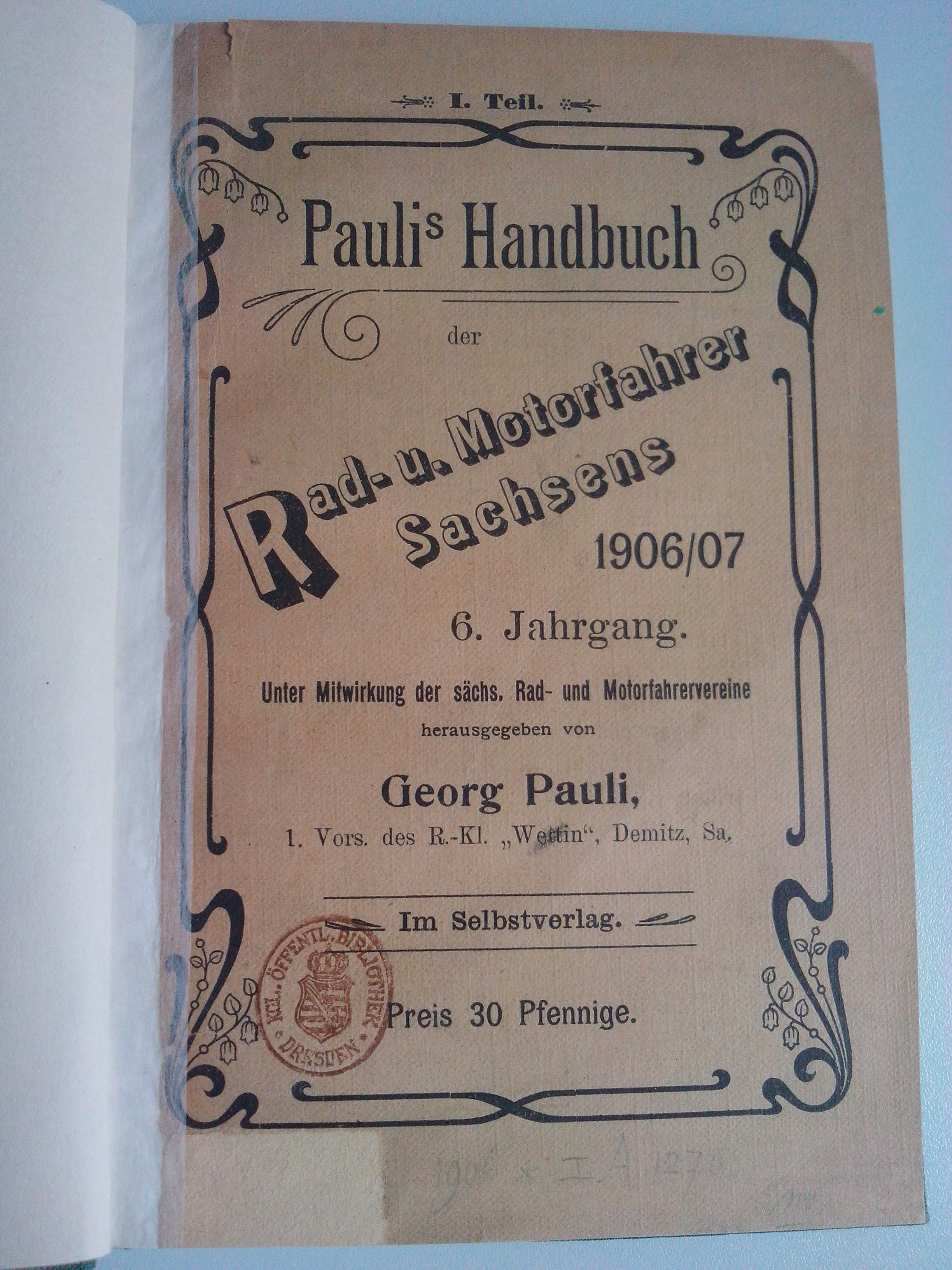 Paulis Handbuch der Rad- und Motorradfahrer Sachsens 1906/07, 1. Teil, 6. Jahrgang – Titelseite